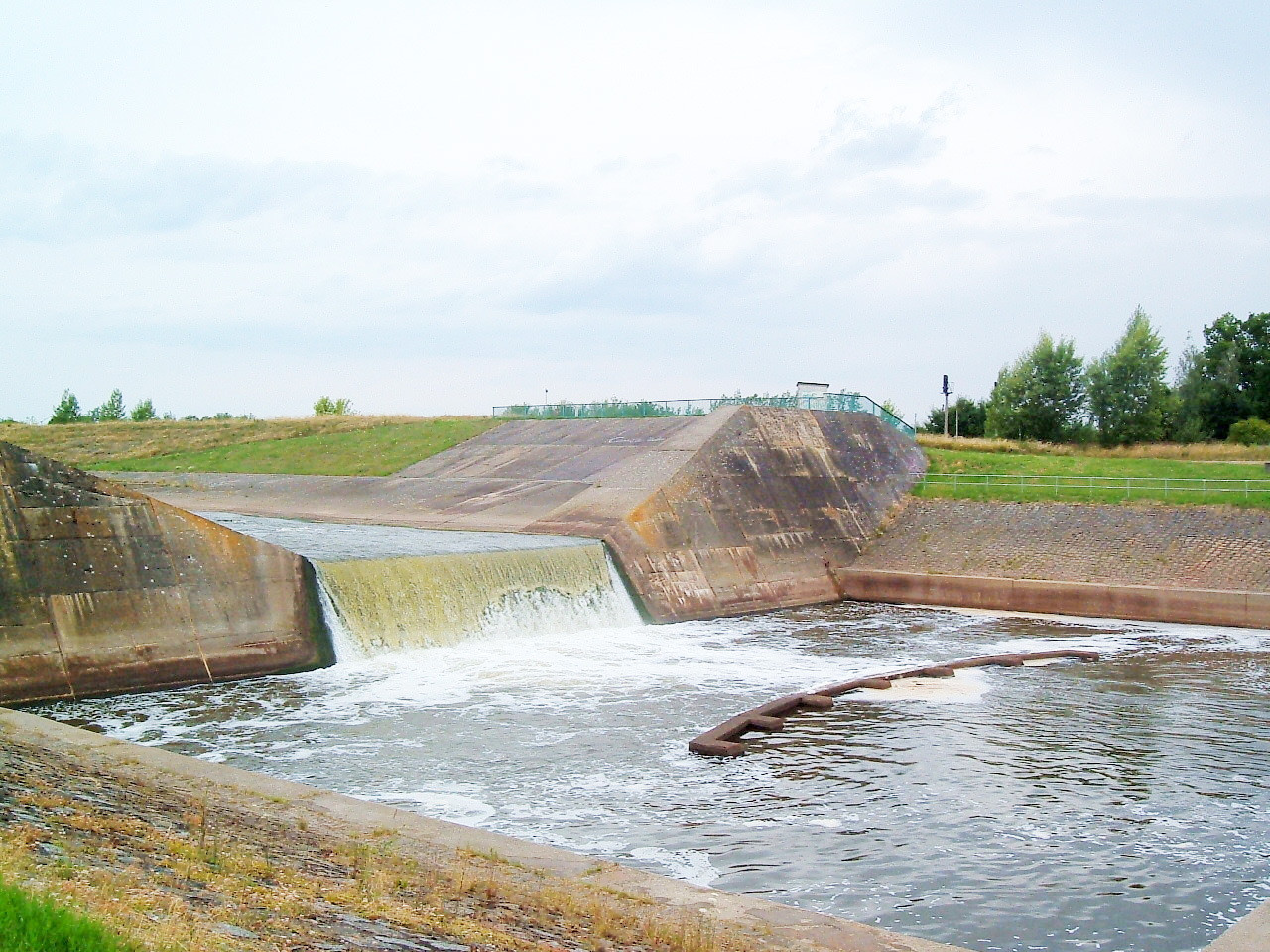 Gefälle am Ende der "Betonelster" (künstliche Verlegung des Flusses Weiße Elster) bei Leipzig-Hartmannsdorf.